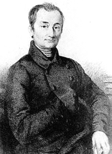 Francisco de Paula Gonzalez Vigil (1792-1875), clerigo, político e intelectual peruano